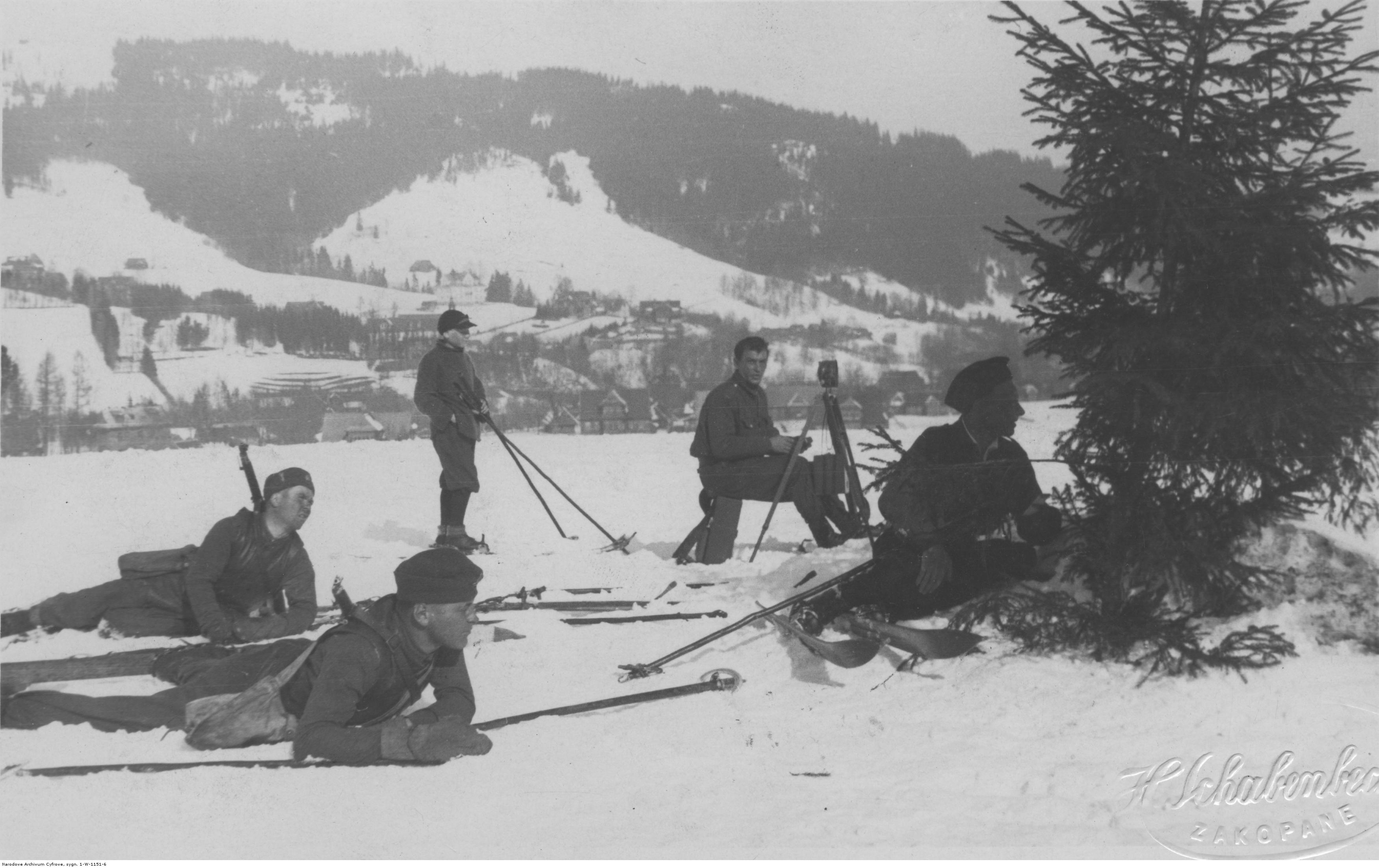 Szkoła wysokogórska przy 21 Dywizji Piechoty Górskiej w Zakopanem; marzec 1928. Stacja optyczna. Koncern Ilustrowany Kurier Codzienny - Archiwum Ilustracji. Sygnatura: 1-W-1151-6